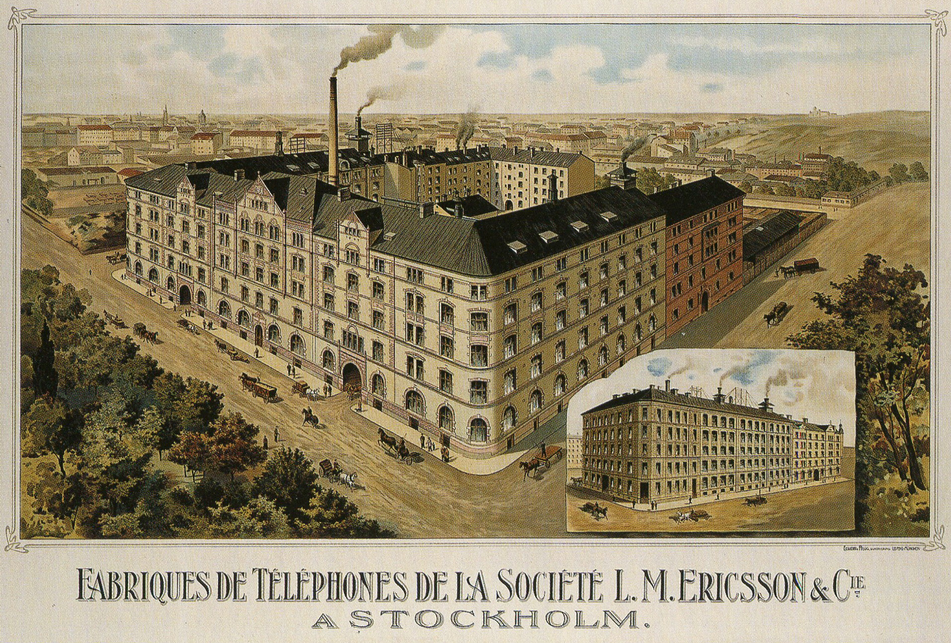 LM Ericsons fabriksbyggnader i Stockholm, Tulegatan 15-19. Den infällda bilden visar Tulegatan 5.